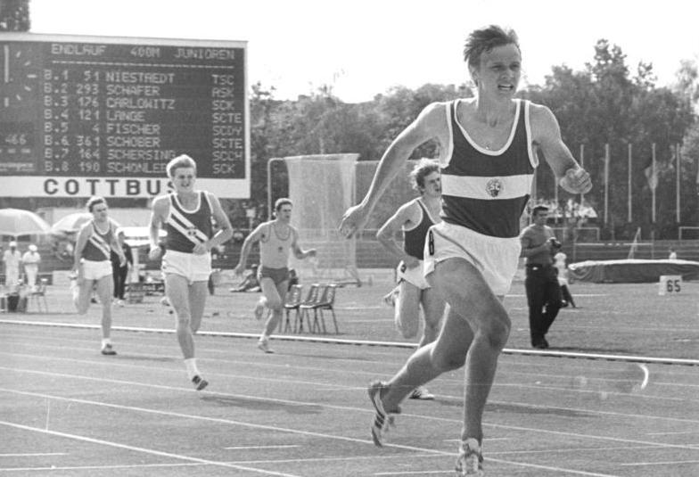 Thomas Schönlebe ADN-ZB Weisflog 24.7.82 Cottbus: DDR-Leichtathletikmeisterschaften der Junioren - Thomas Schönlebe vom SC Karl-Marx-Stadt siegte im 400-m-Lauf der Junioren in 46,74 s. (siehe 40 und 42 N) .